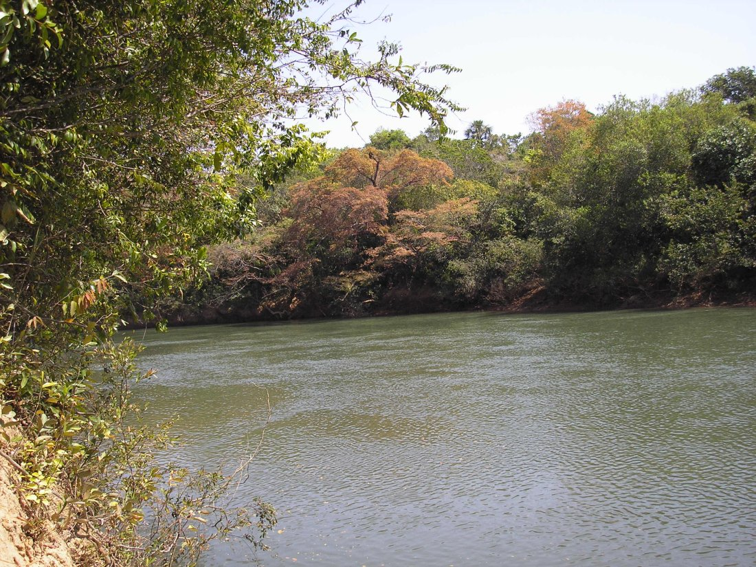 Rio São Marcos, divisor dos estados brasileiros de Goiás e Minas Gerais. Esta foto é na região mineira do Mundo Novo, município de Paracatu. Foto de Denis Conrado.